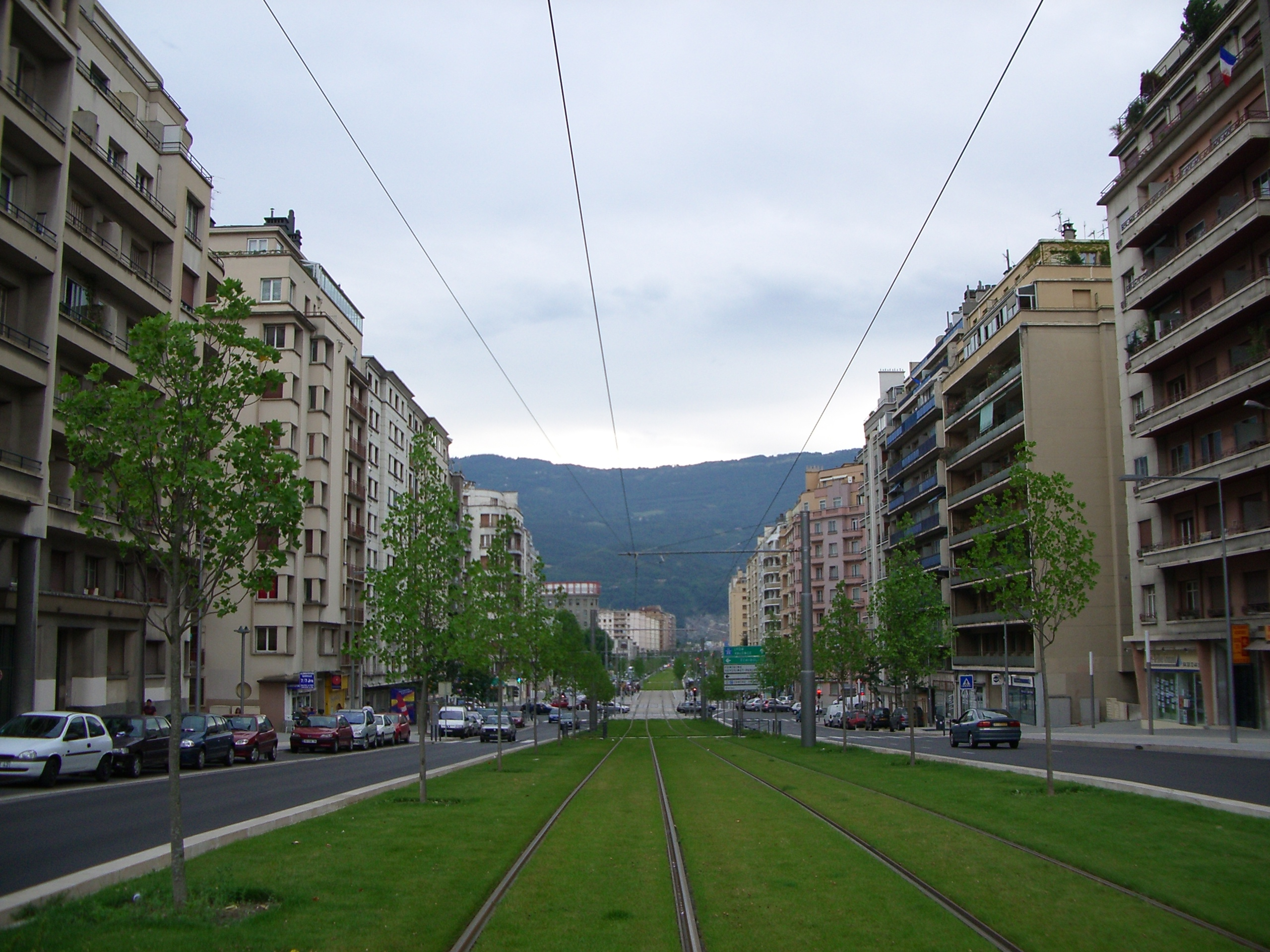 Grands boulevards de Grenoble, boulevards Foch et Joseph vallier vus vers l'Ouest